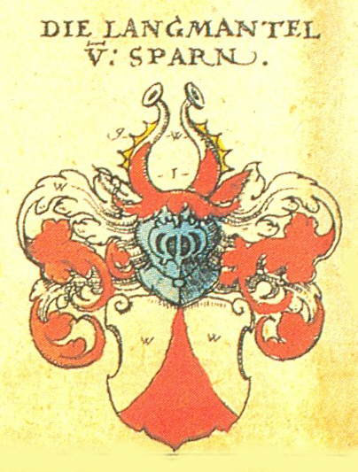 Stammwappen der Augsburger Patrizierfamilie Langmantel von Sparren